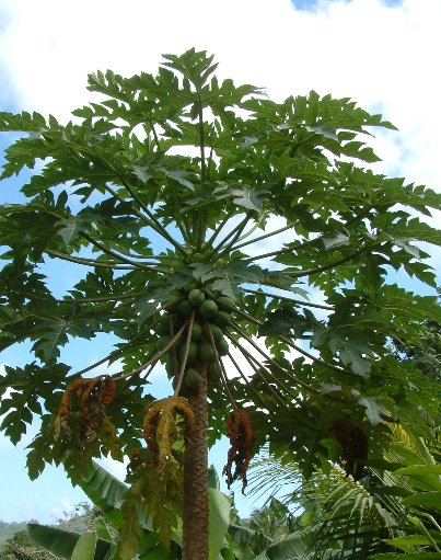 Papayapflanze mit Früchten